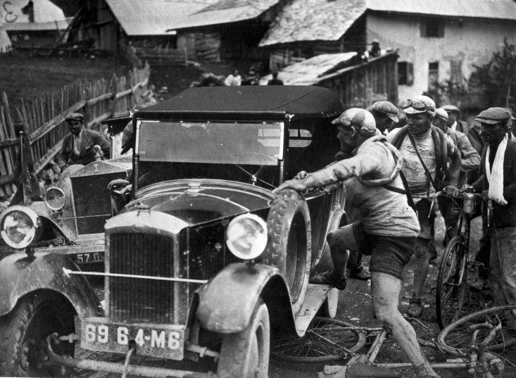 Spaarnestad Photo, SFA001012879 Felix Sellier is kwaad nadat hij is aangereden door een automobilist. De Belg Emile Masson senior luistert mee. Tour de France, begin jaren 1920. Collectie SPAARNESTAD PHOTO/Fotograaf onbekend Felix Sellier is angry after being hit by a car. Tour de France, early 1920s. Voor meer informatie en voor meer foto’s uit de collectie van Spaarnestad Photo, bezoek onze Beeldbank: U kunt ons helpen onze kennis van de fotocollecties te verrijken door tags en commentaren toe te voegen. Herkent u mensen of locaties of heeft u een bijzonder verhaal te vertellen bij één van de foto’s, laat dan een reactie achter (als u ingelogd bent bij Flickr) of stuur een mailtje naar: You can help us gain more knowledge on the content of our collection by simply adding a comment with information. If you do not wish to log in, you can write an e-mail to: According to L'Equipe: Tour de France 100 Ans: From 1925, stage Nice-Briançon.